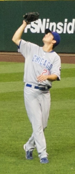 Tyler Colvin